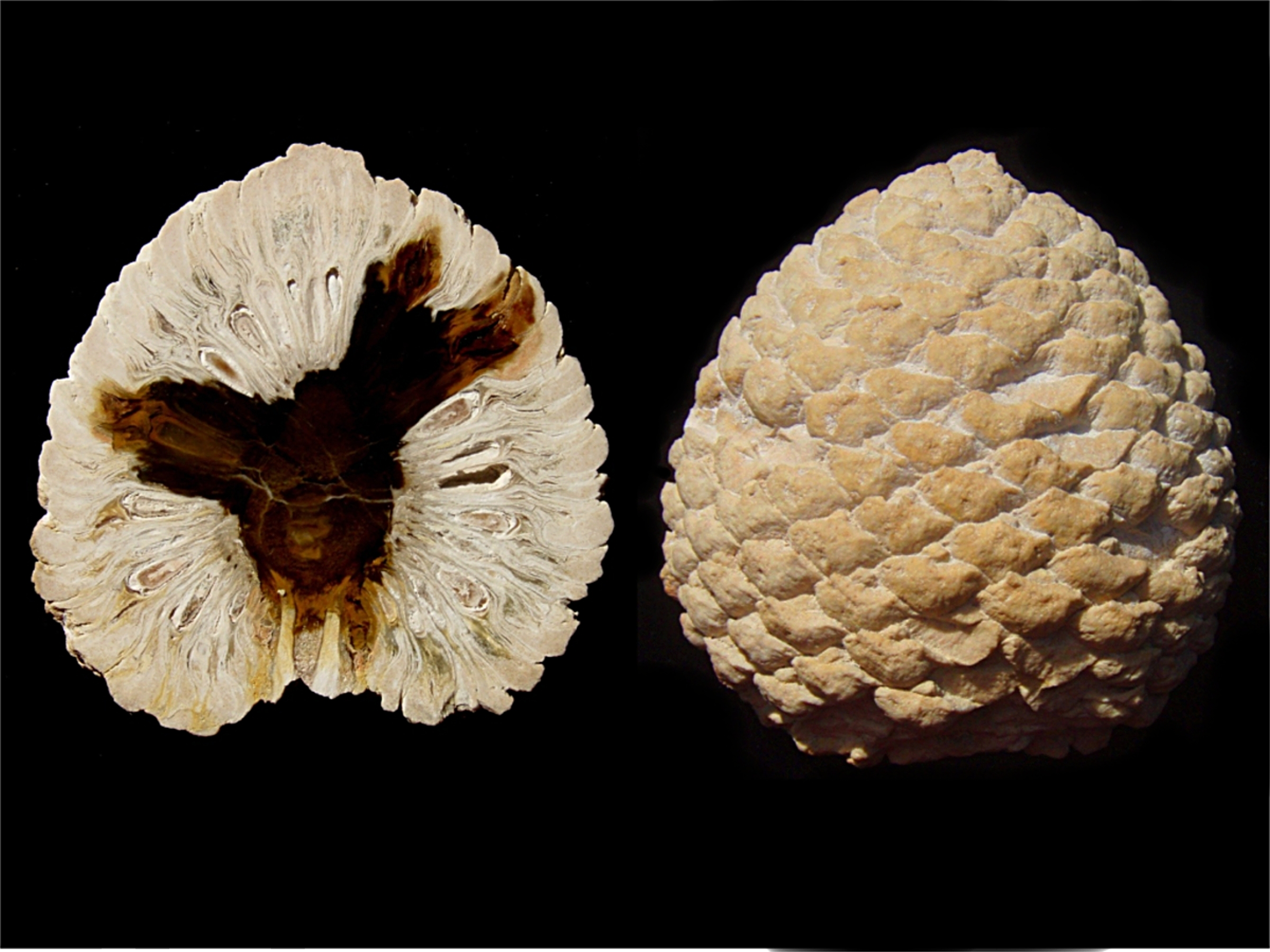 Petrified Araucaria mirabilis Cone; Age: Jurassic (approx. 160 mya);Location: Patagonia, Argentina